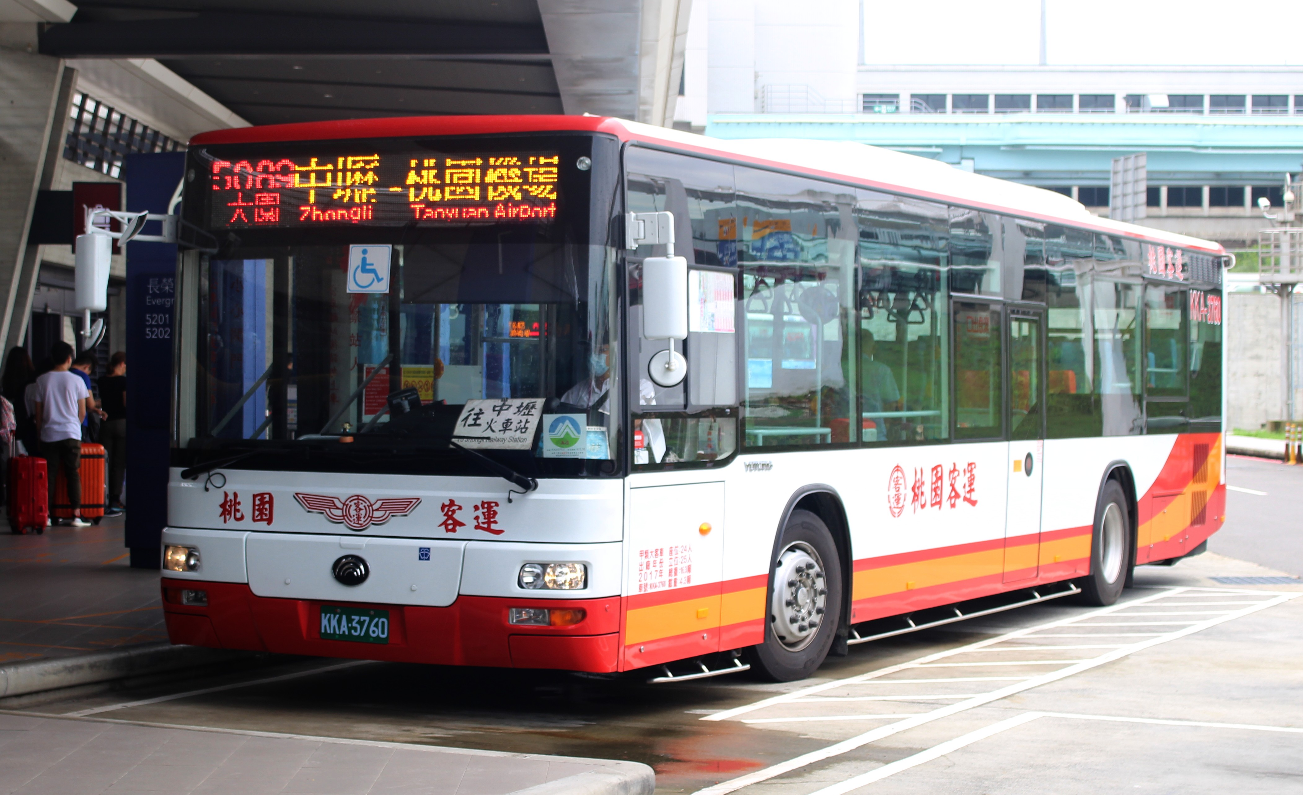 2017 YUTONG ZK6128HG KKA-3760 5089